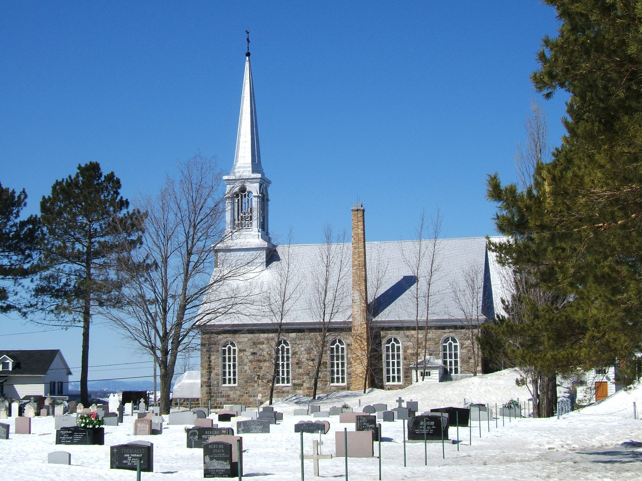 Vue de l'église de Saint-Modeste au Bas-Saint-Laurent, Québec, Canada